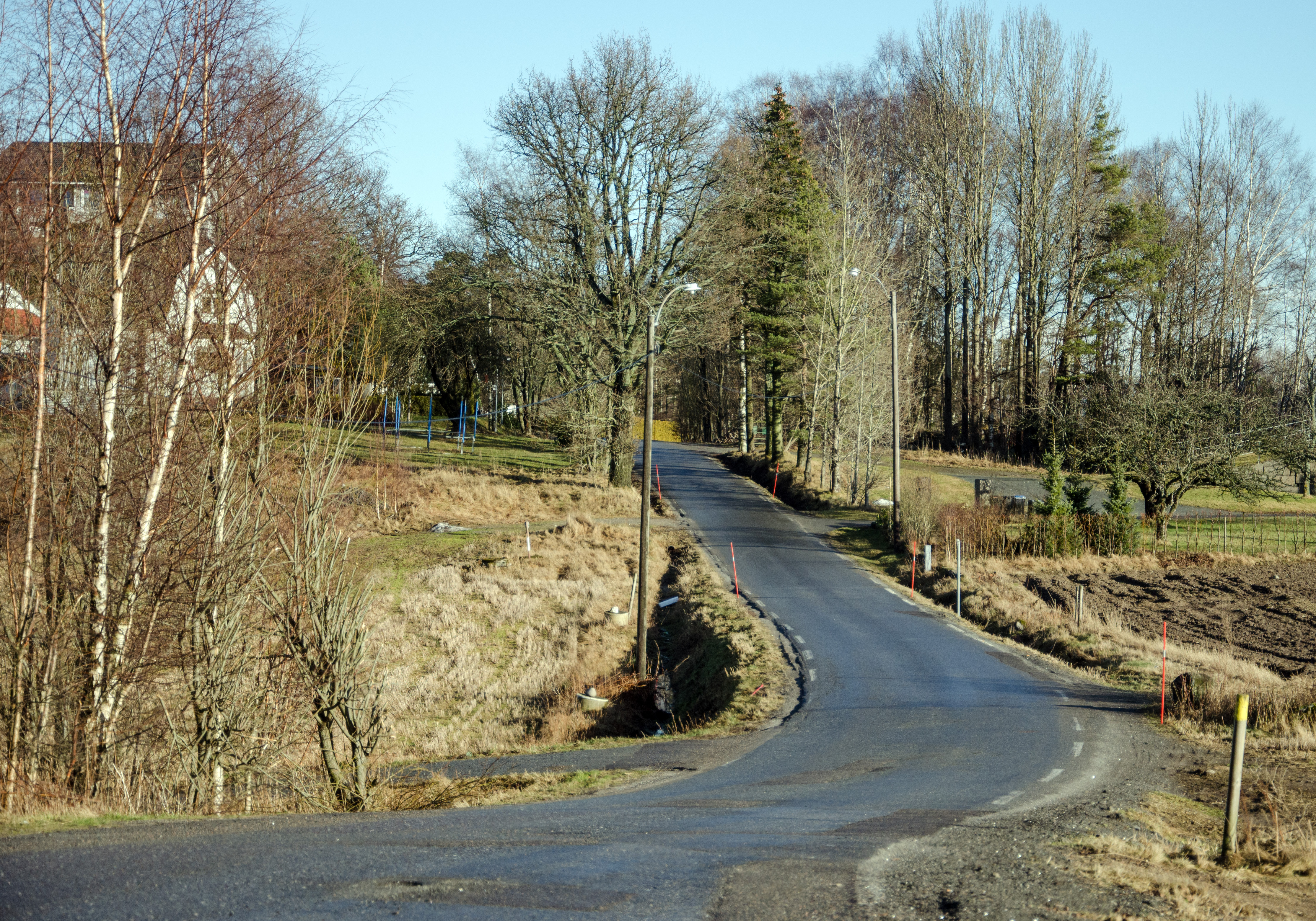 Fylkesvei 170 Syrristveien